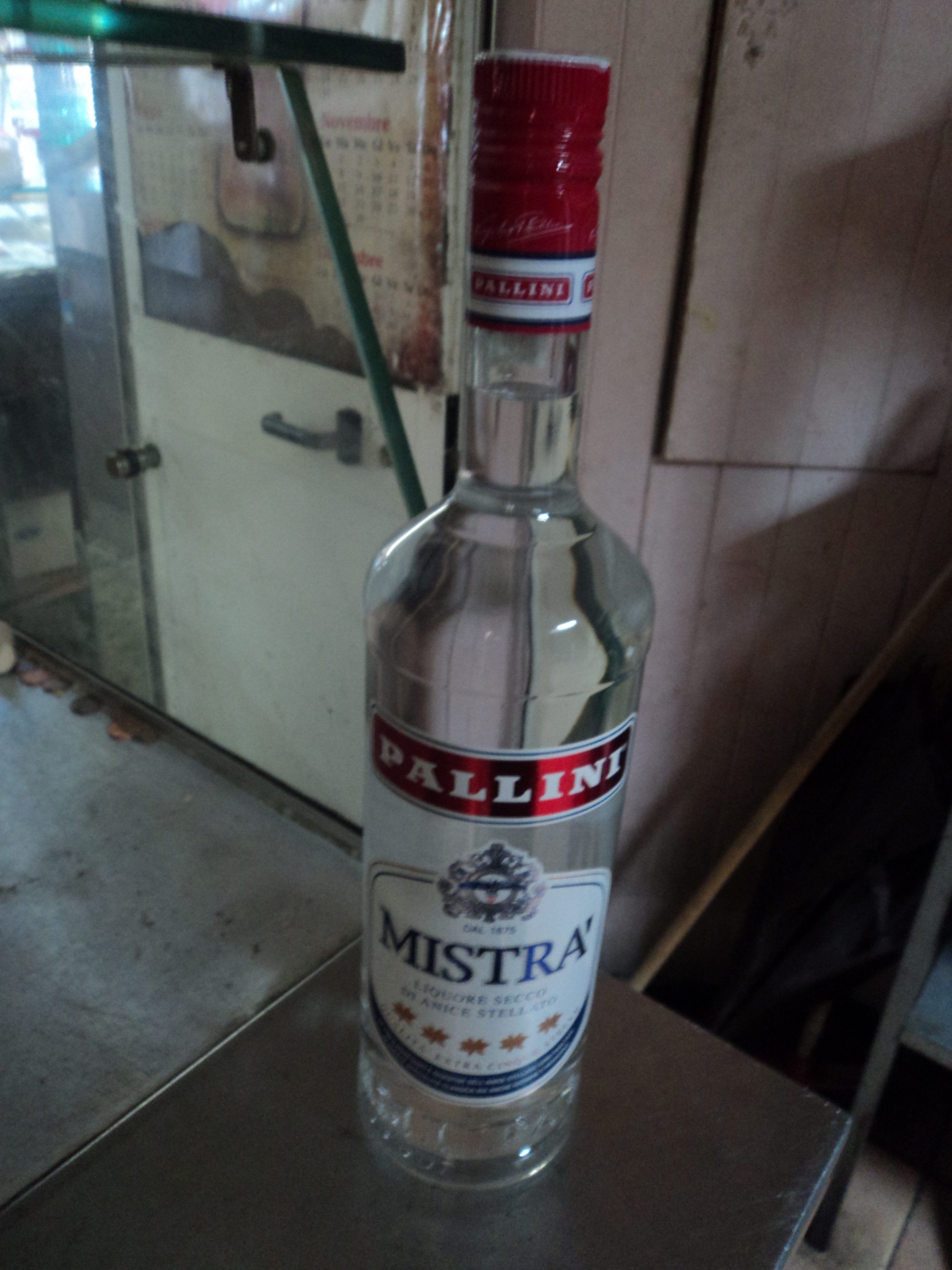 Mistrà Pallini